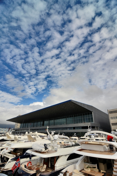 Il padiglione B durante il 50° salone nautic0